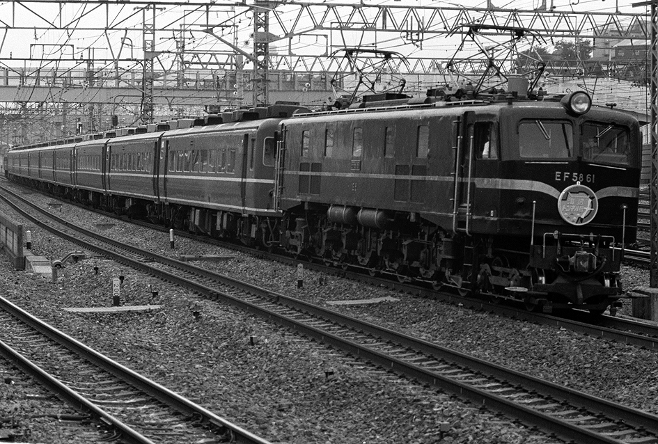 東海道貨物線を行く EF58 61けん引「海底トンネル号」（14系座席車+EF66 12） 京浜急行花月園前駅から撮影